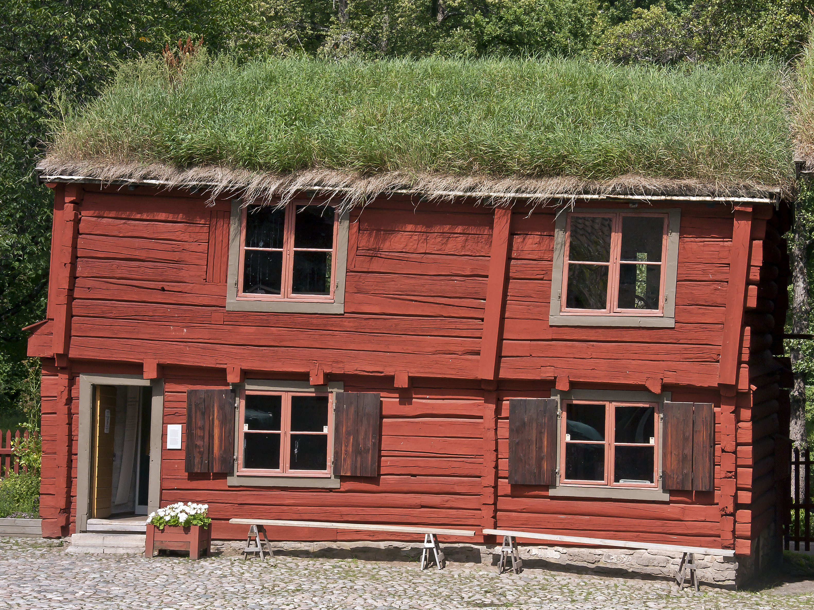 Cajsa Wargs hus, eller Borgarhuset, från 1600-talet i friluftsmuseet Wadköping i Örebro.